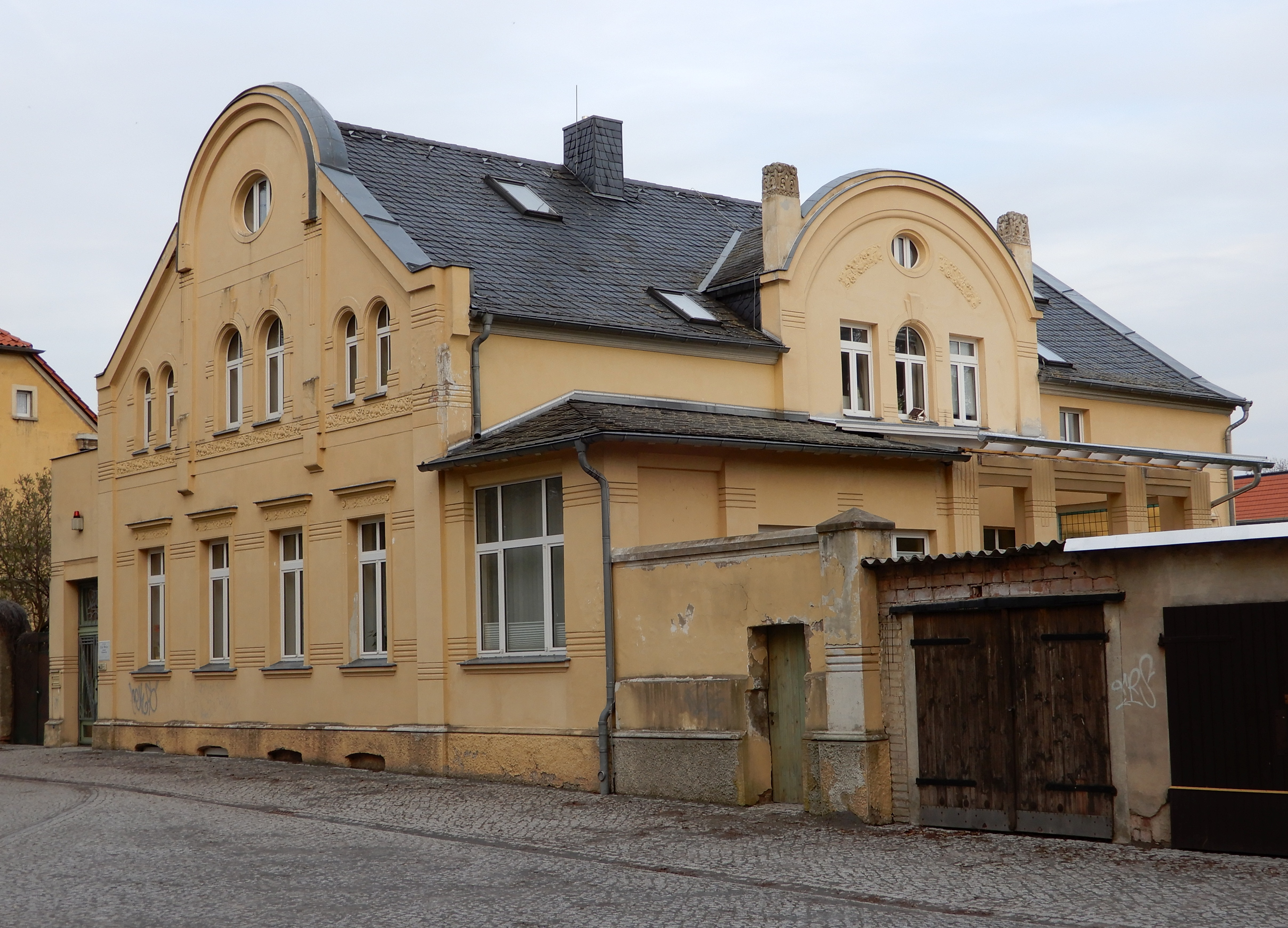 Wohnhaus Dr.-Wilhelm-Külz-Platz 26